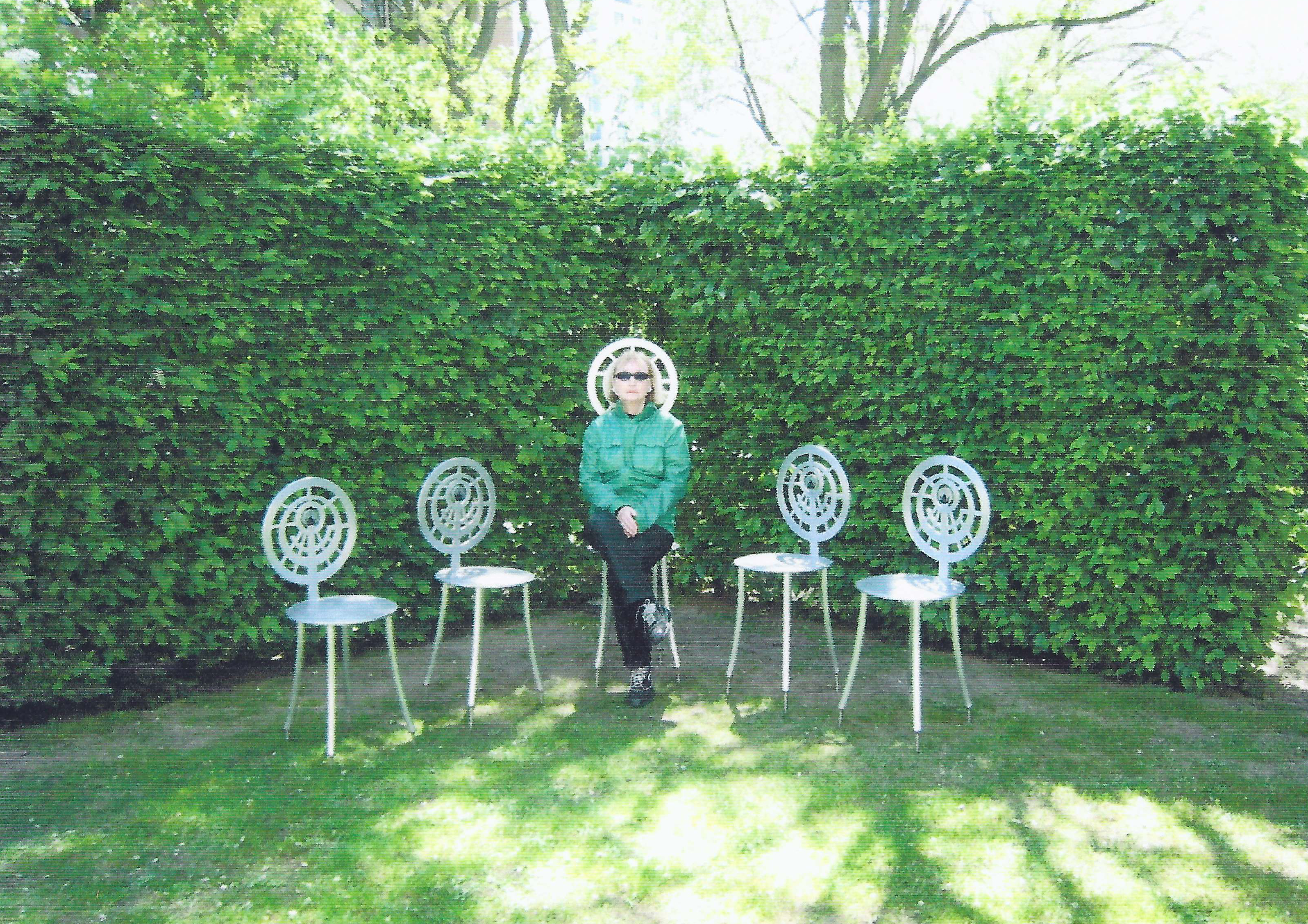 Regierungssitz und Berliner Stühle von Ursula Stock, Aluminium, 2007, Berlin, Landesvertretung Baden-Württemberg, Tiergartenstraße 15.